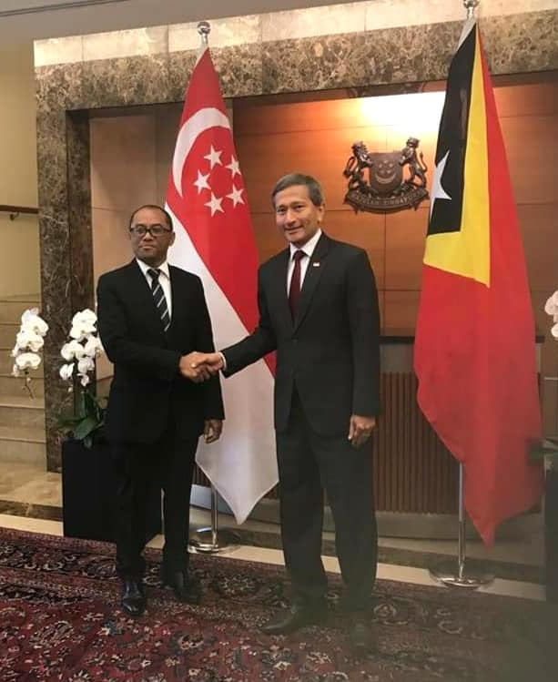 Osttimors Außenminister Dionísio Babo besucht Singapurs Außenminister Vivian Balakrishnan